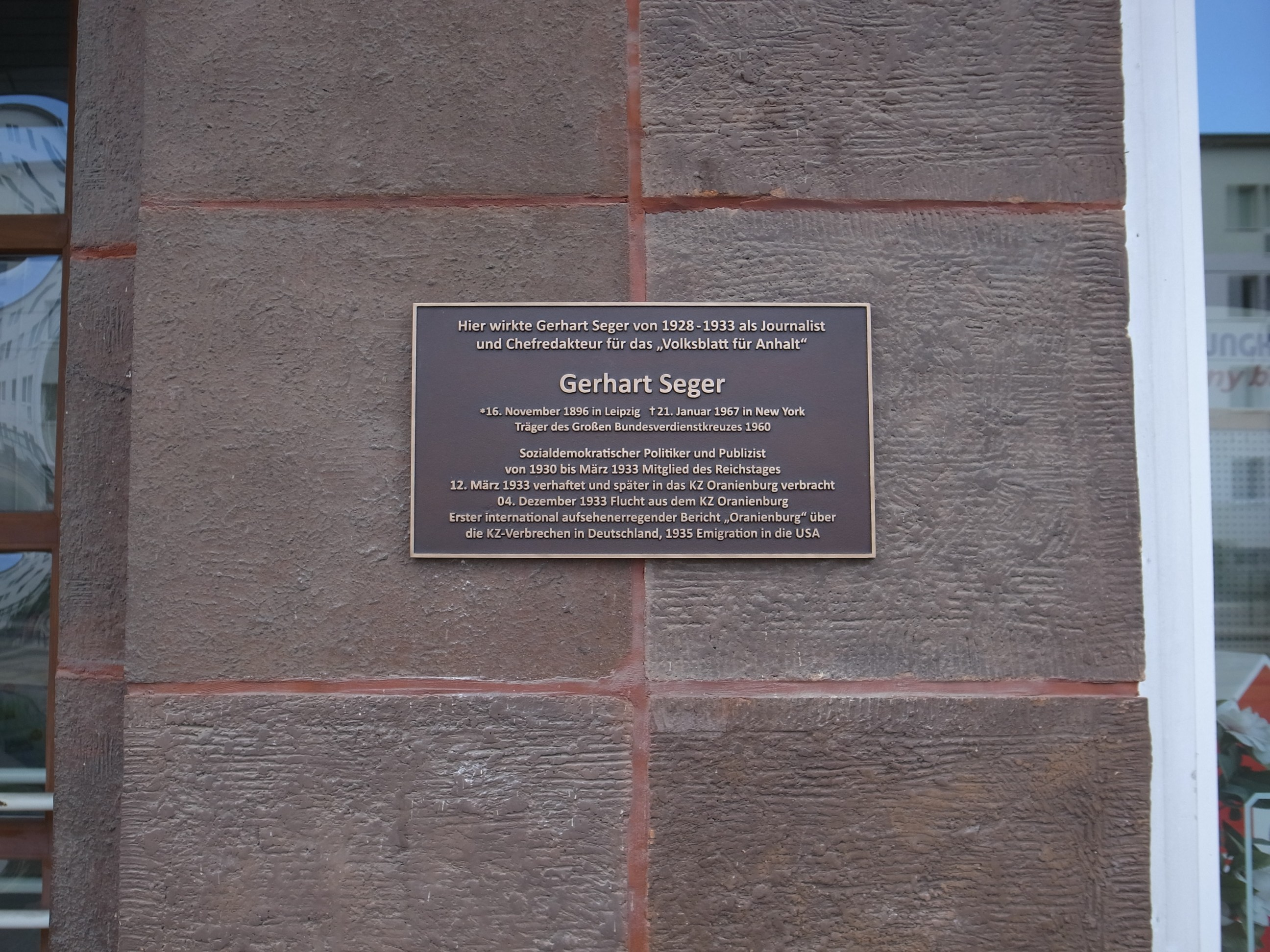 Dessau, Gedenktafel für Gerhart Seger am Druckhaus (Druckerei Volksblatt)